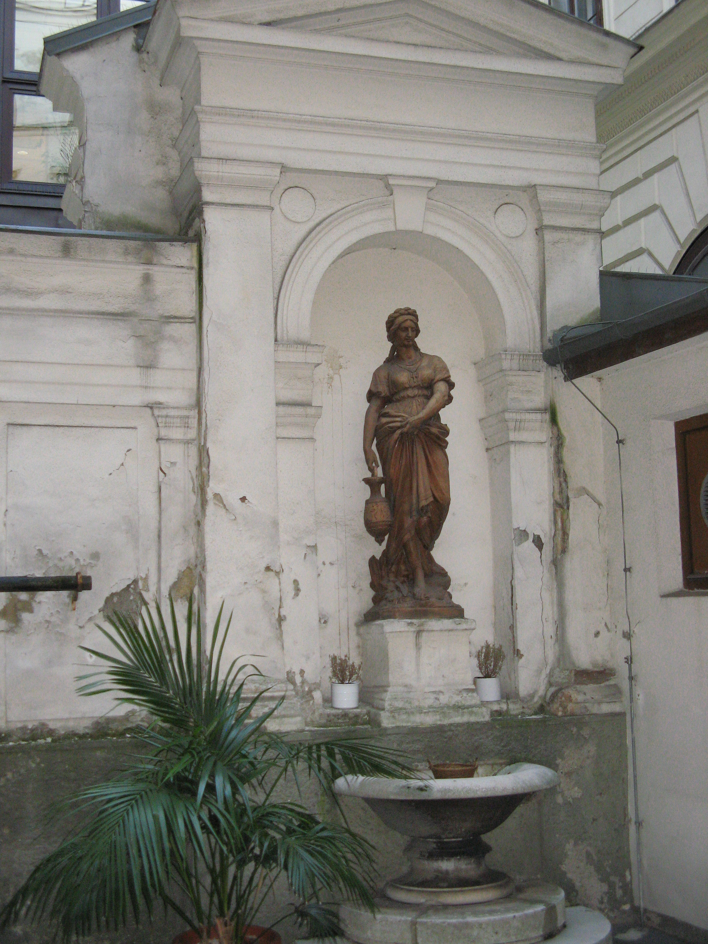 Brunnen im Innenhof des Hauses Rathausstraße 21, Wien-Innere Stadt